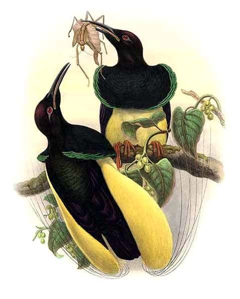 Seleucidis melanoleuca